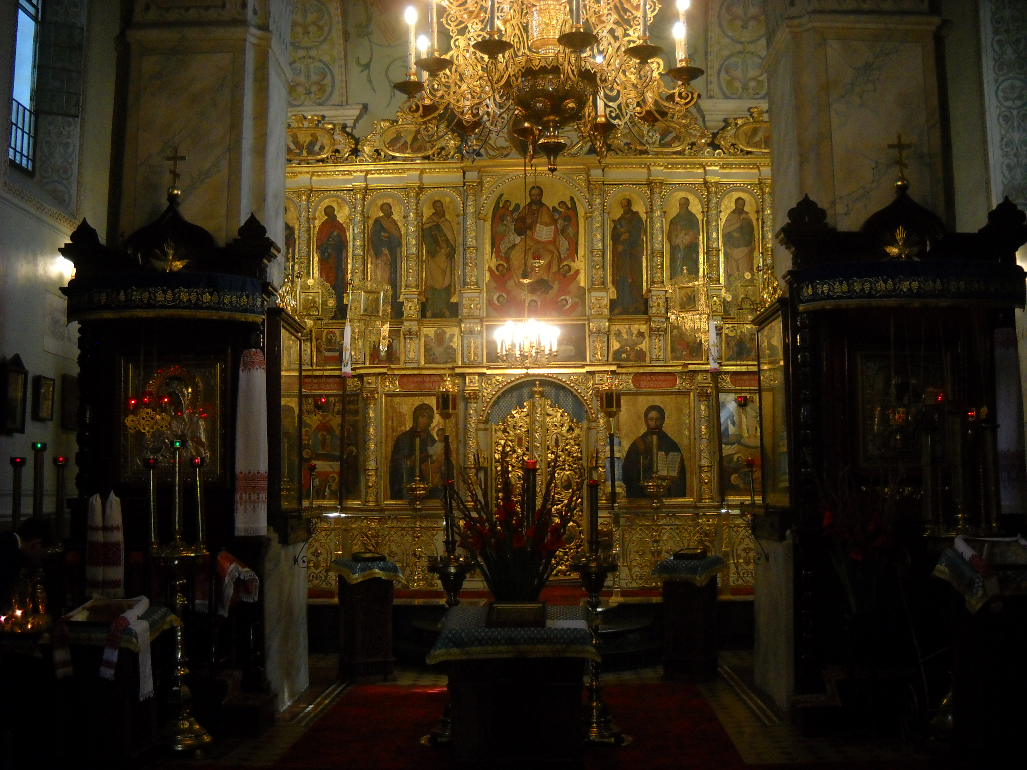 Wnętrze soboru Przemienienia Pańskiego w Lublinie